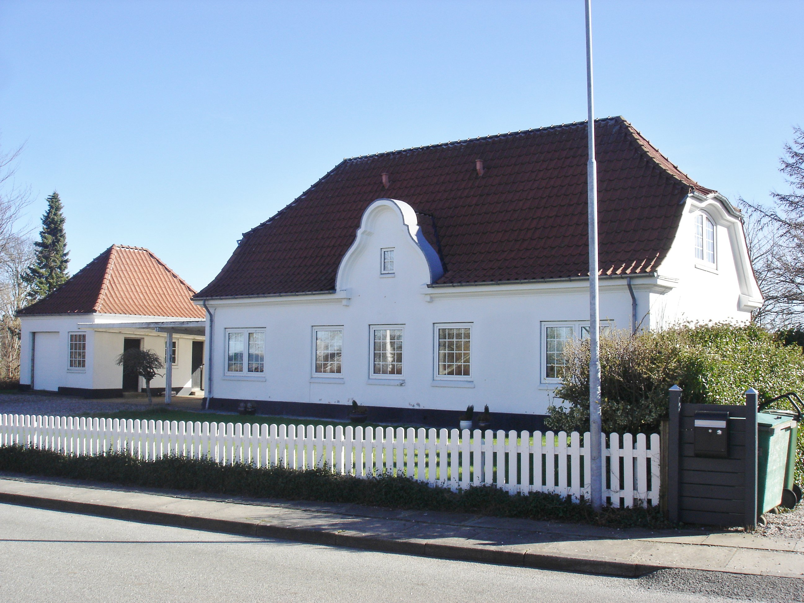 Fandrup Station